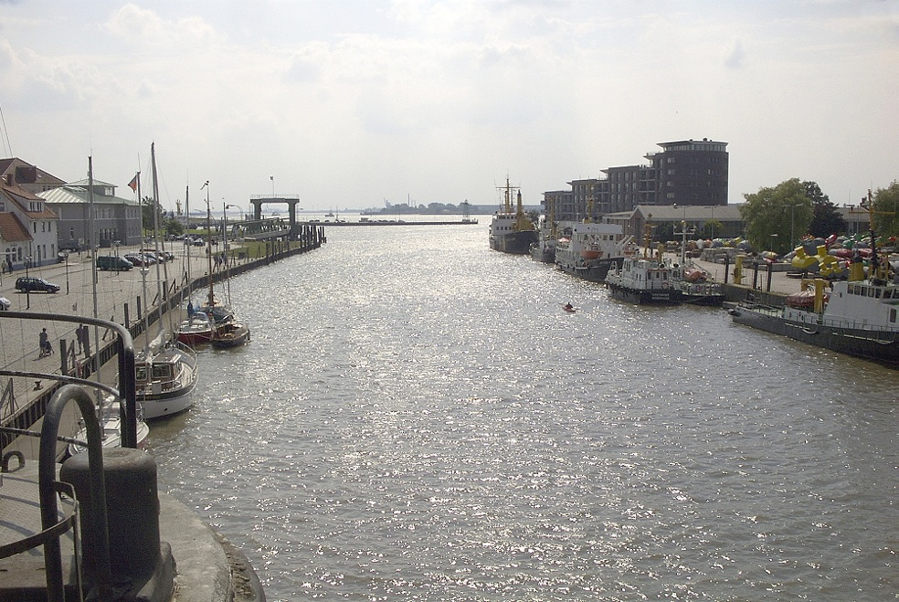 Die Geestemonding in Bremerhaven.